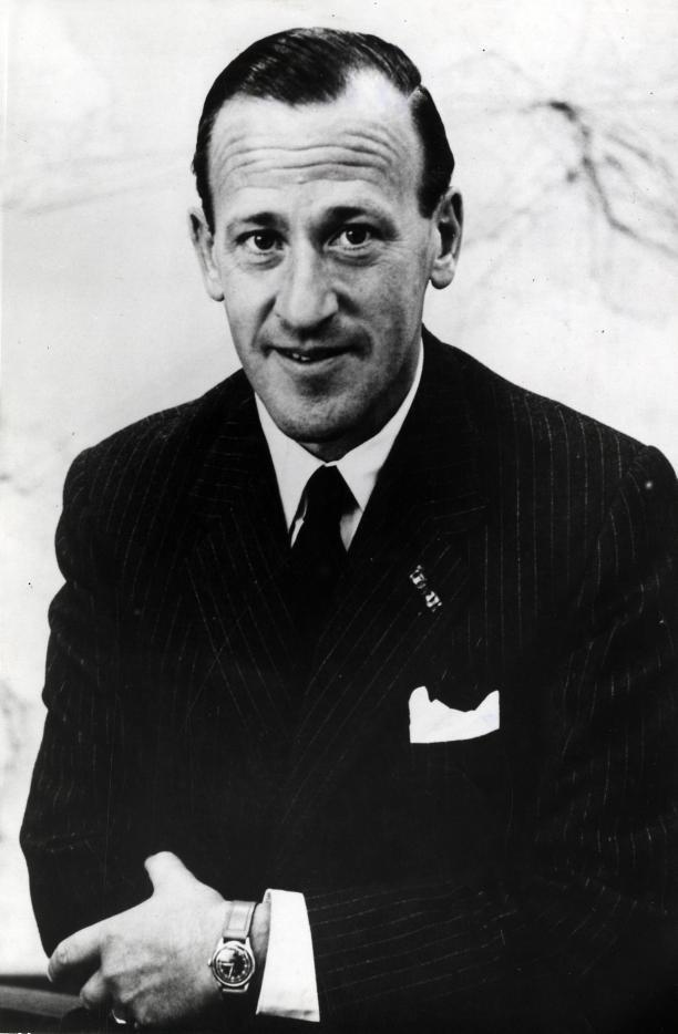 Beugel, E.H. van der (PvdA). Portret van drs. Ernst van den Beugel. 14 maart 1961 of eerder